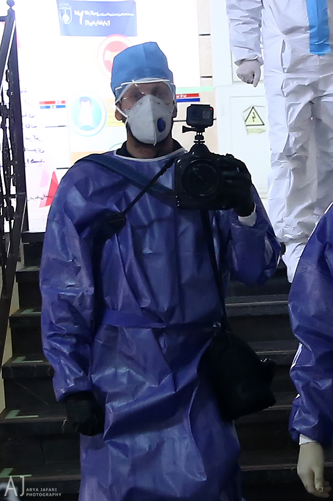 عکاسی از داخل بیمارستان امین اصفهان پس از ورود کرونا به ایران